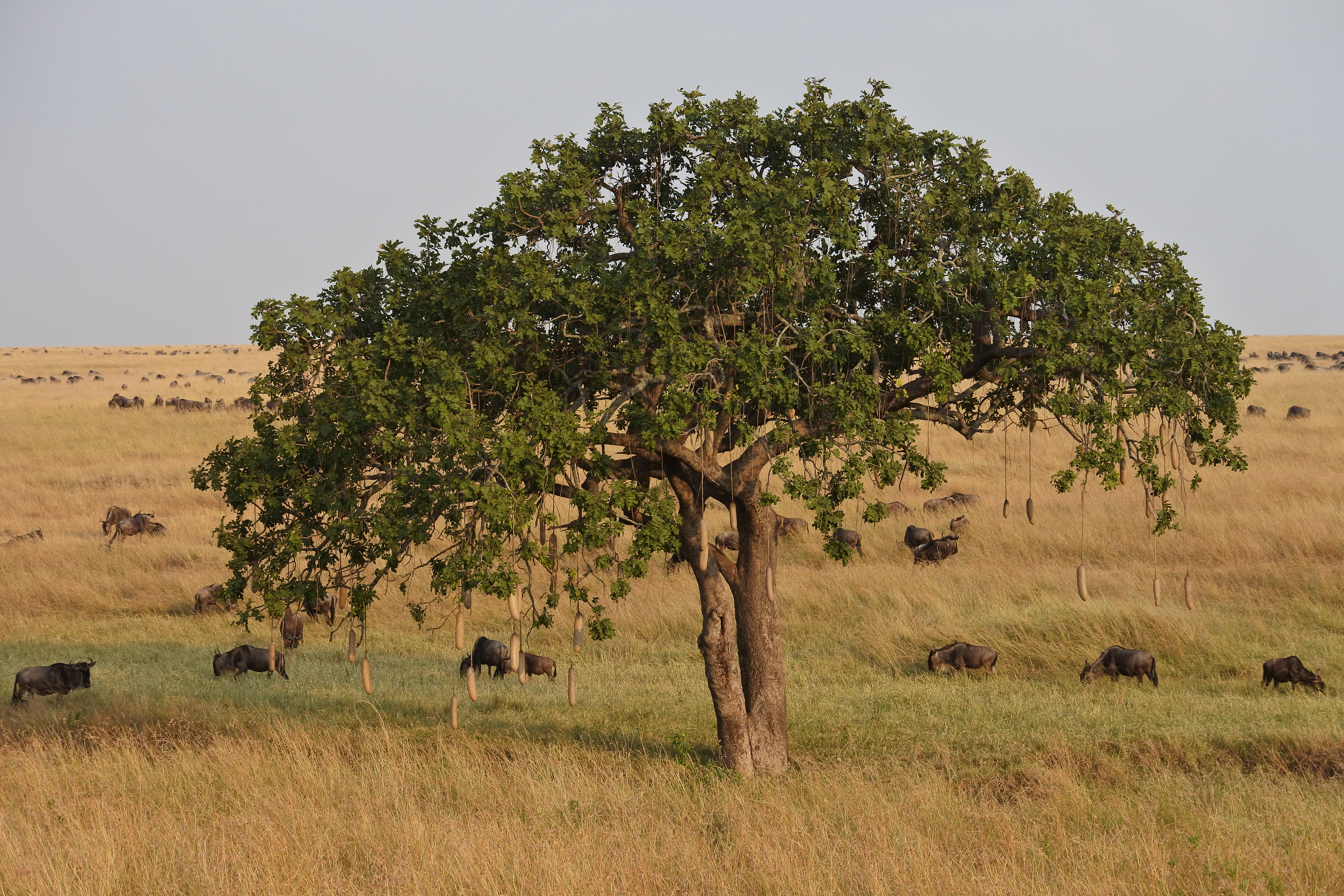 Kigelia africana